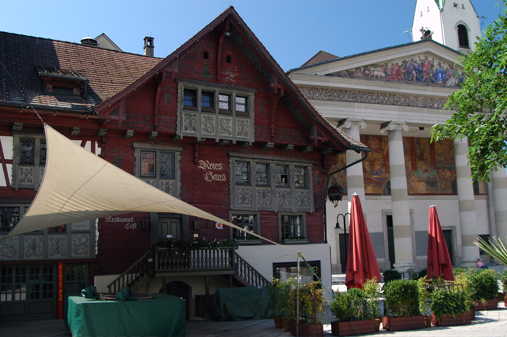 Das rote Haus neben der St. Martin Kirche Dornbirn, 15.8.2004